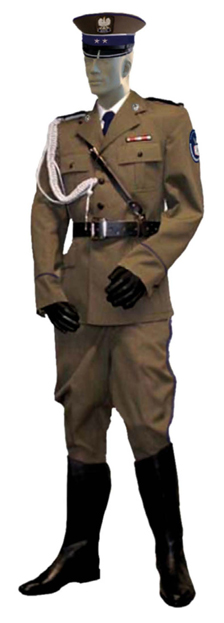 Umundurowanie reprezentacyjne ABW